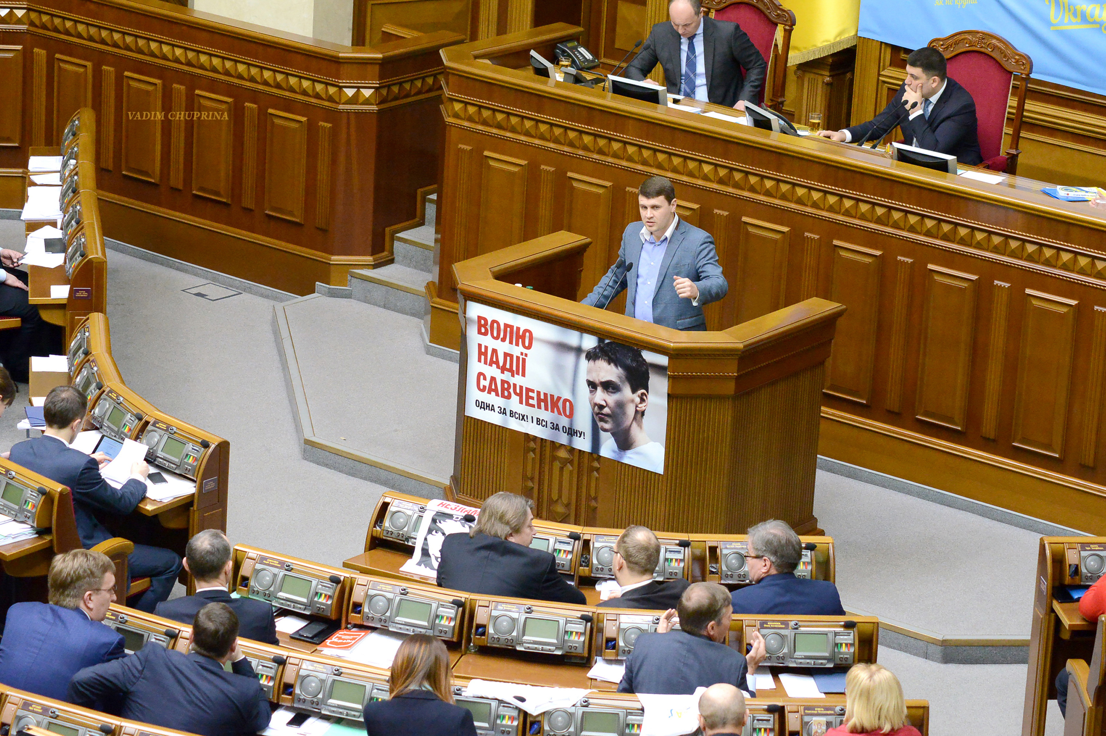 ВЕРХОВНА РАДА УКРАЇНИ 2015 , фото Вадим Чуприна